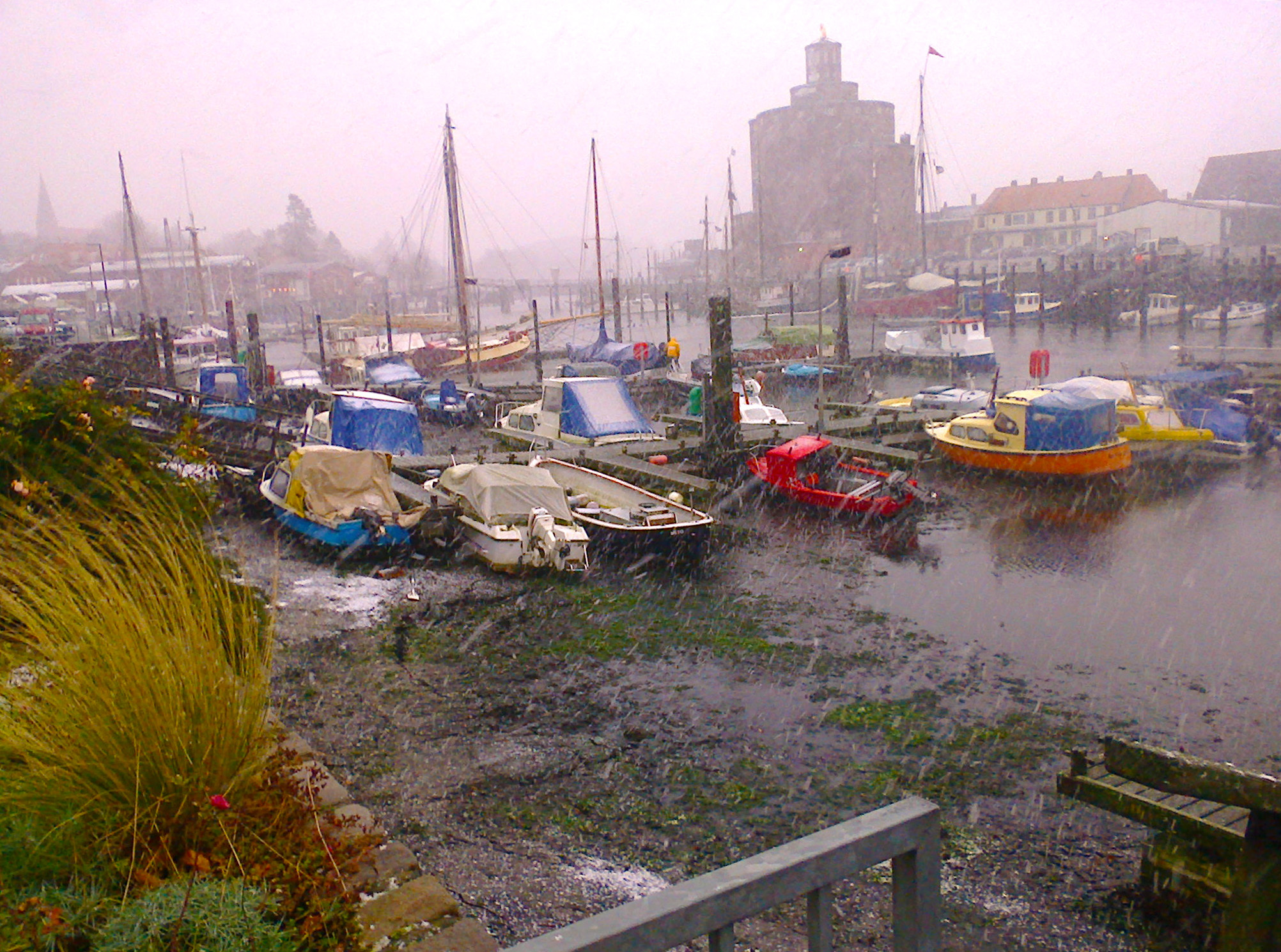 Extremes Niedrigwasser im Eckernförder Hafen während des Orkans Xaver. Sämtliche Schwimmstege liegen auf Grund.